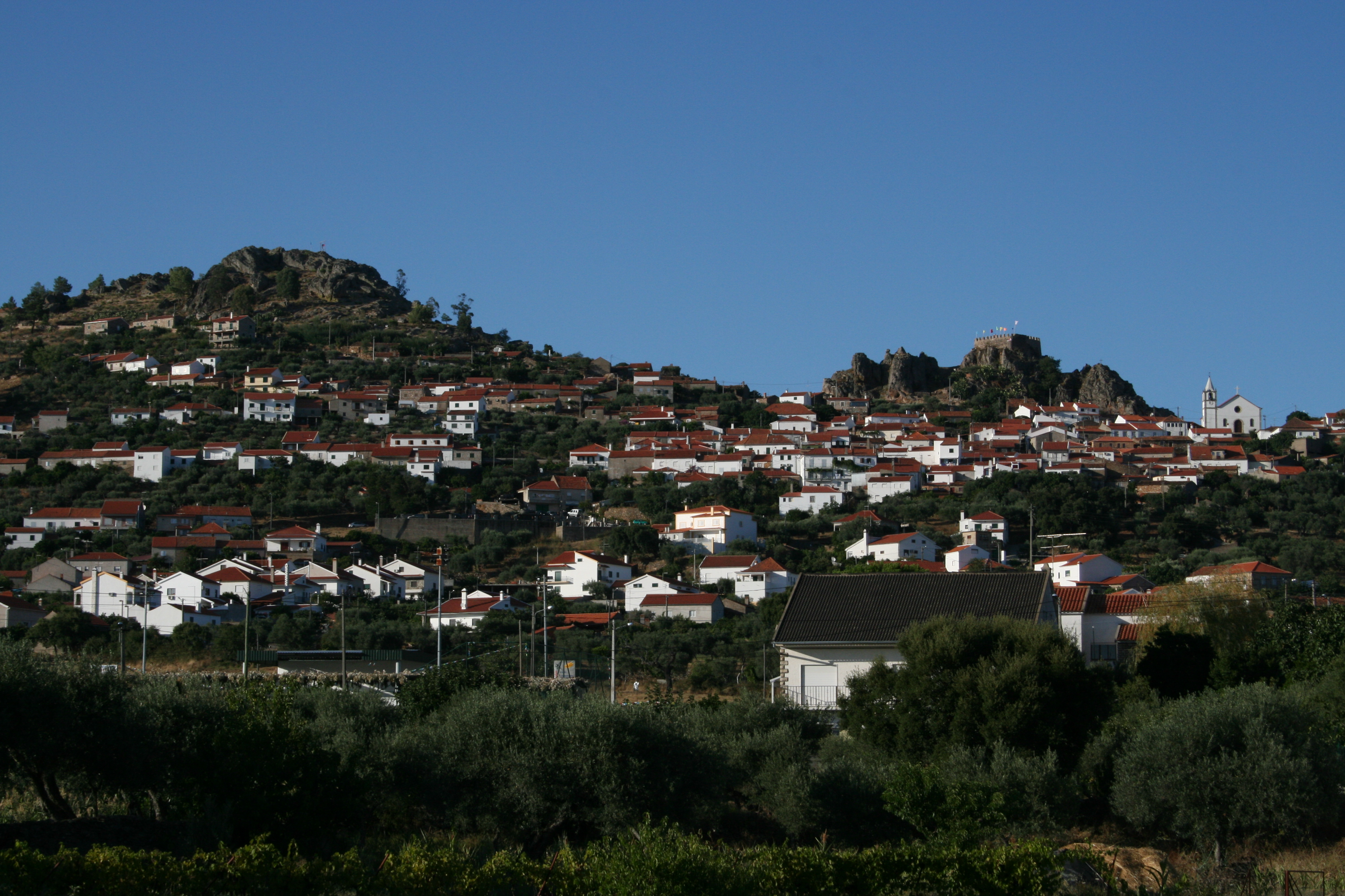 Vue générale